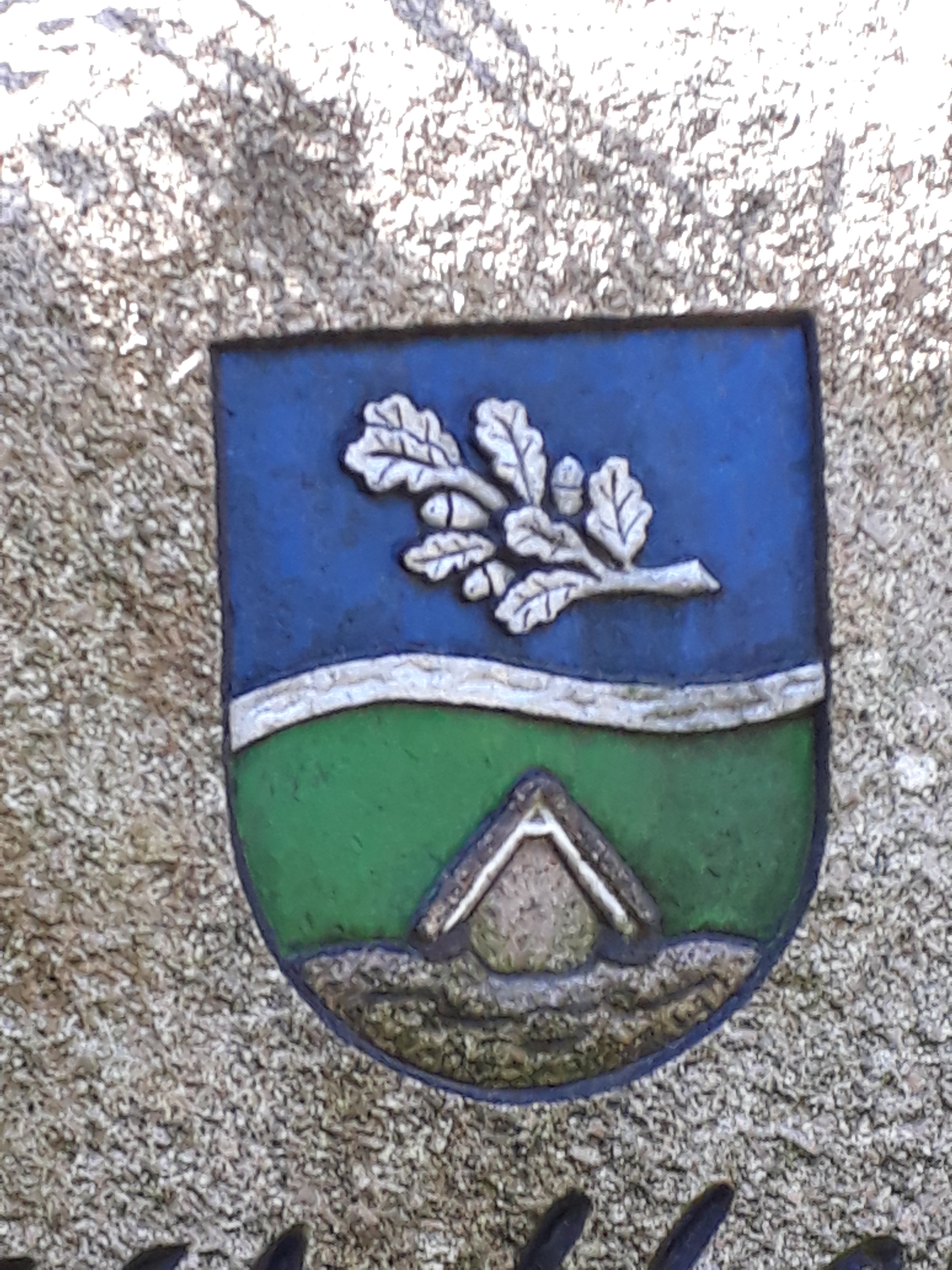 Wappen von Klethen, Ahlerstedt.